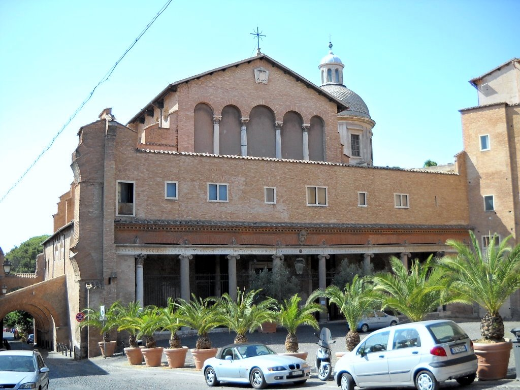 Roma_Celio_S_Giovanni_e_Paolo